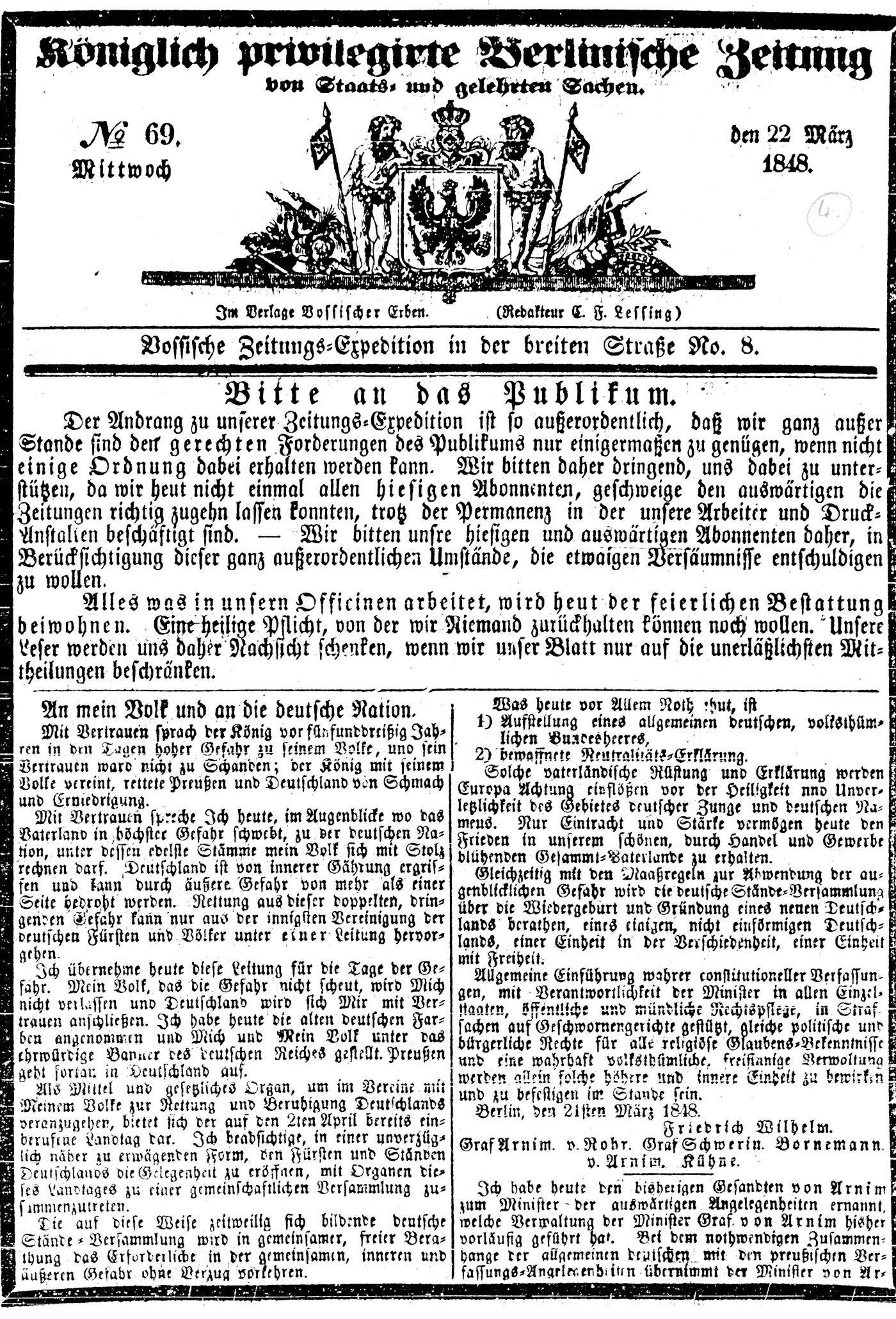 "Vossische Zeitung", Berlin. Title-page.